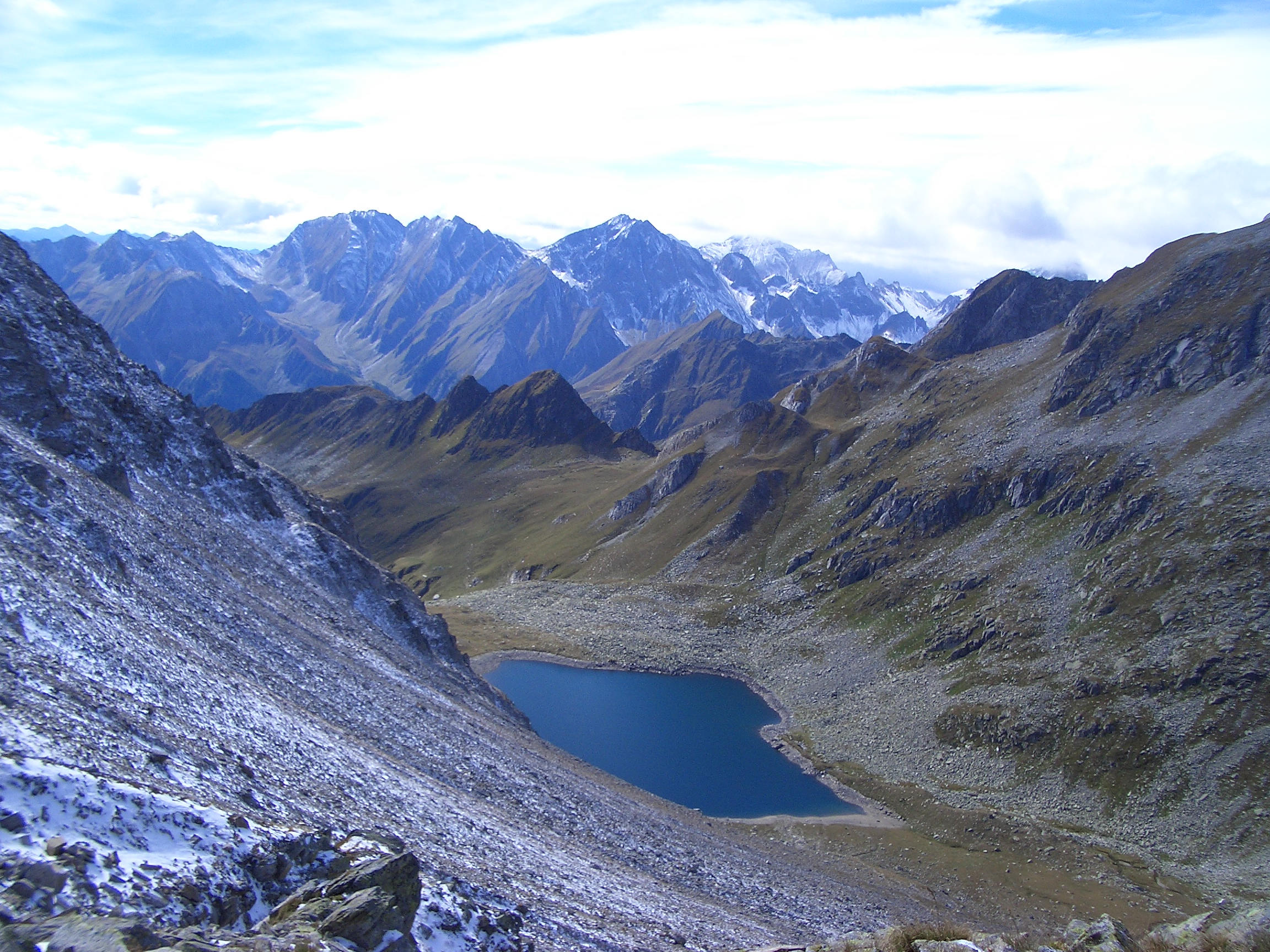 Eisbruggsee. Blick auf Ribigenspitz, Rotwand und Wurmaulspitze vom Pfunderer Höhenweg in der Nähe der Edelrauthütte.